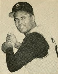 Baseball Guide and Record Book 1962より。ロベルト・クレメンテ